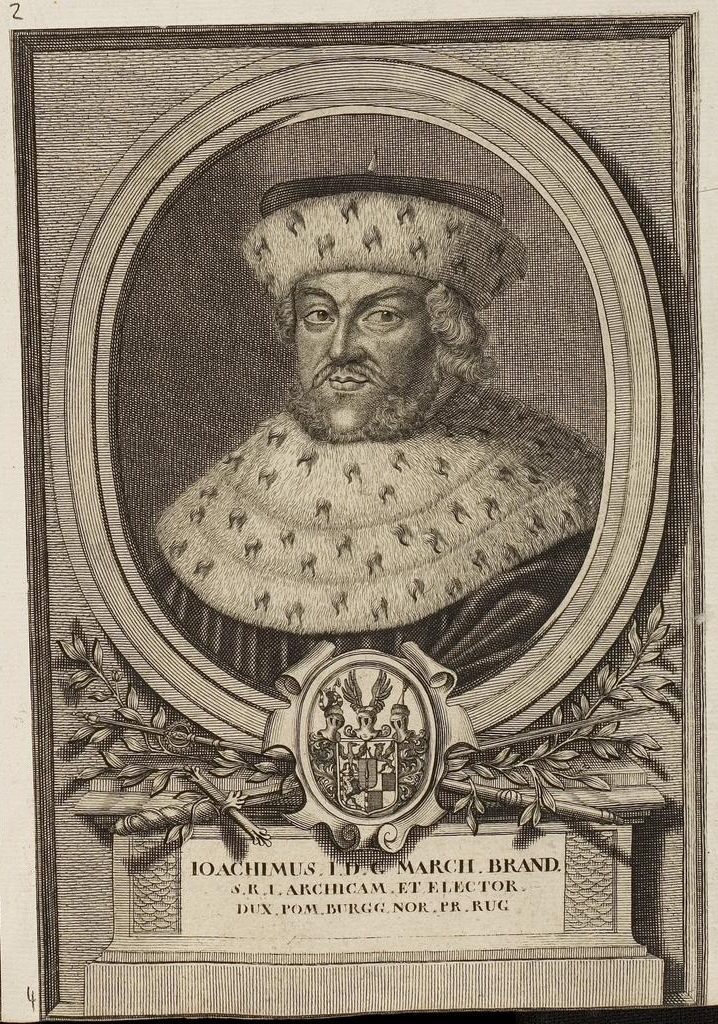 Grafik aus dem Klebeband Nr. 1 der Fürstlich Waldeckschen Hofbibliothek Arolsen Motiv: Kurfürst Joachim I. von Brandenburg